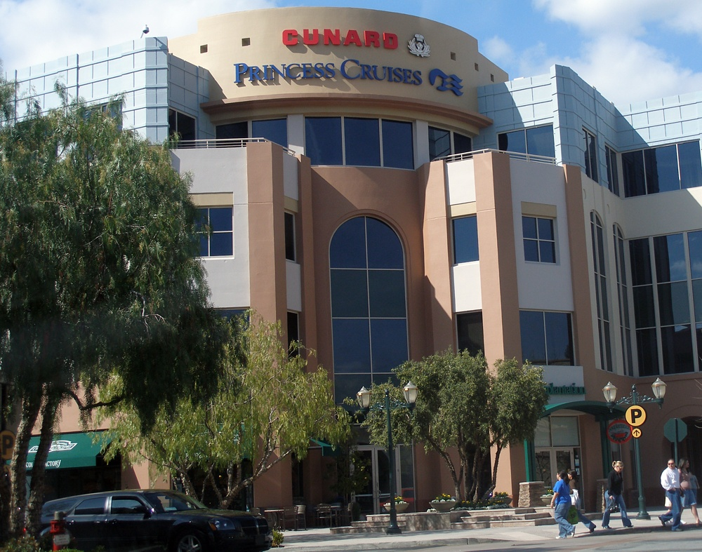 Siege social de la princess cruise et de la cunar à santa clarita